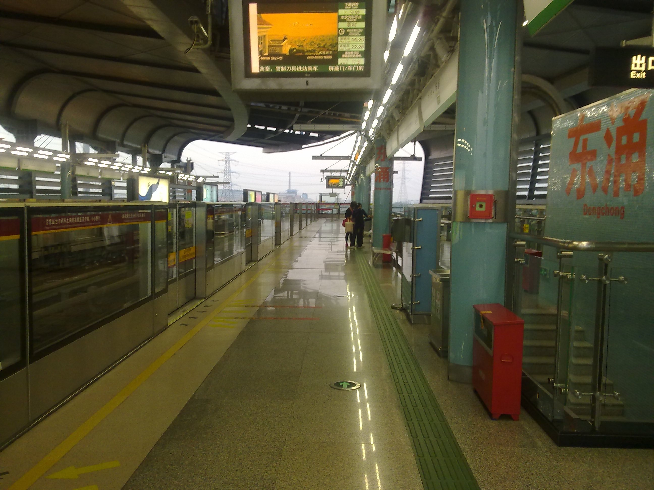 廣州地鐵東涌站站台